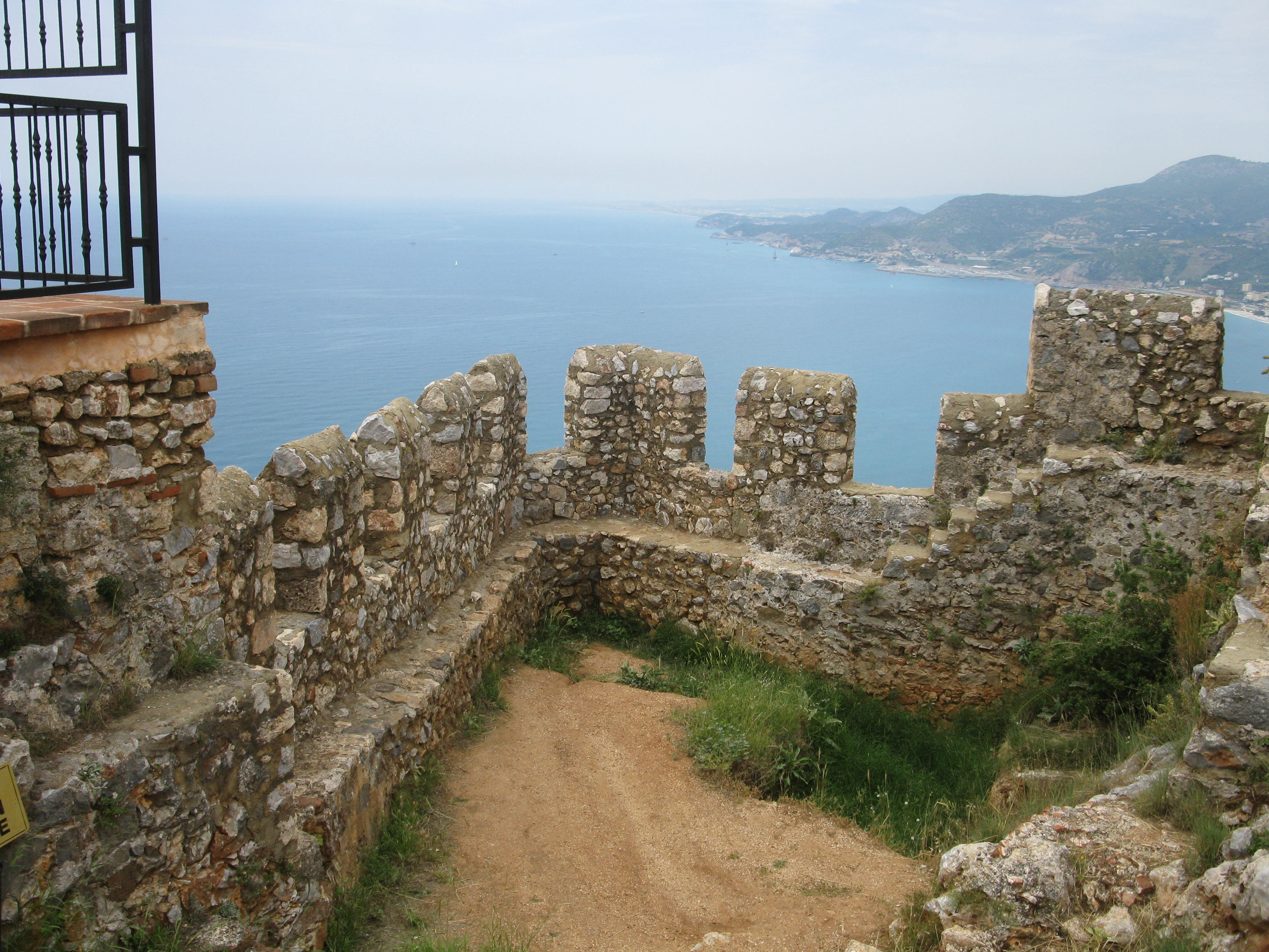 Zamek w Alanii